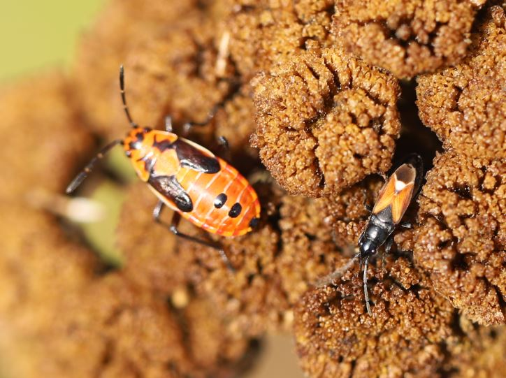 Ritterwanzen-Nymphe und Pterotmetus staphyliniformis auf verblühtem Rainfarn; am 15. August 2020 in der Schwetzinger Hardt